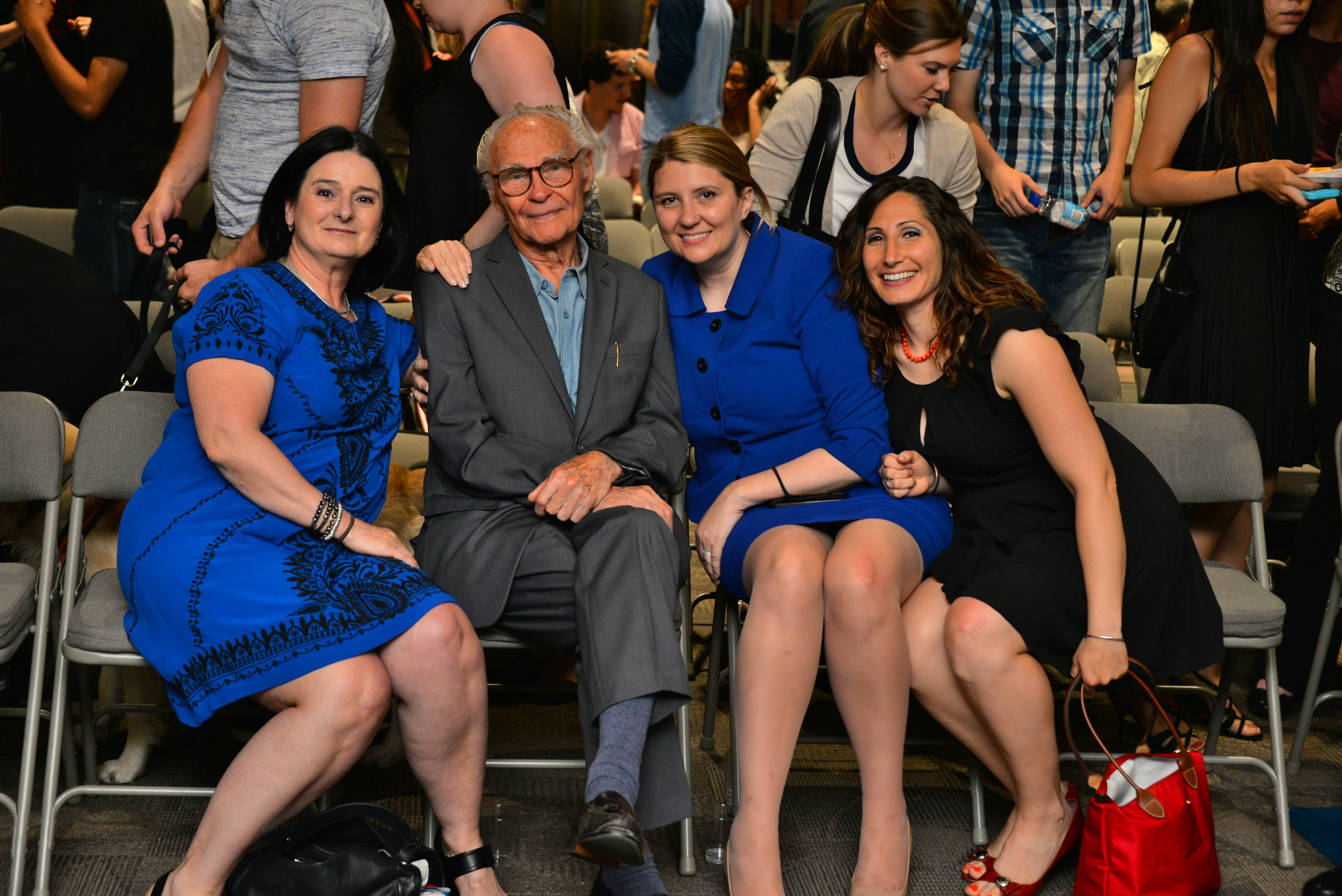 М.Стадник, М.Латишко, А.Халупа та Н.Ґерера на конференції, присвяченій сучасному прочитанню Орвела в контексті Голодомору, Міська рада Торонто, Канада